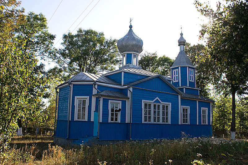 церковь села Мошана